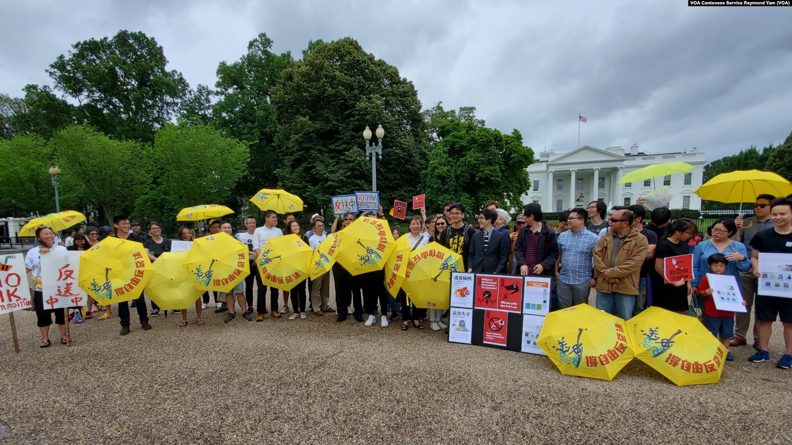 几十人星期天下午两点在白宫北面反对香港《逃犯条例》修订